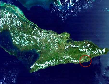 NASA-Satellitenfoto Süd-Kuba, Guantanamo Bay hervorgehoben, public domain